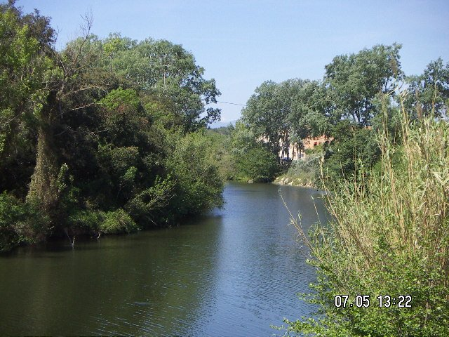 Foto procedente de Viquipedia catalana